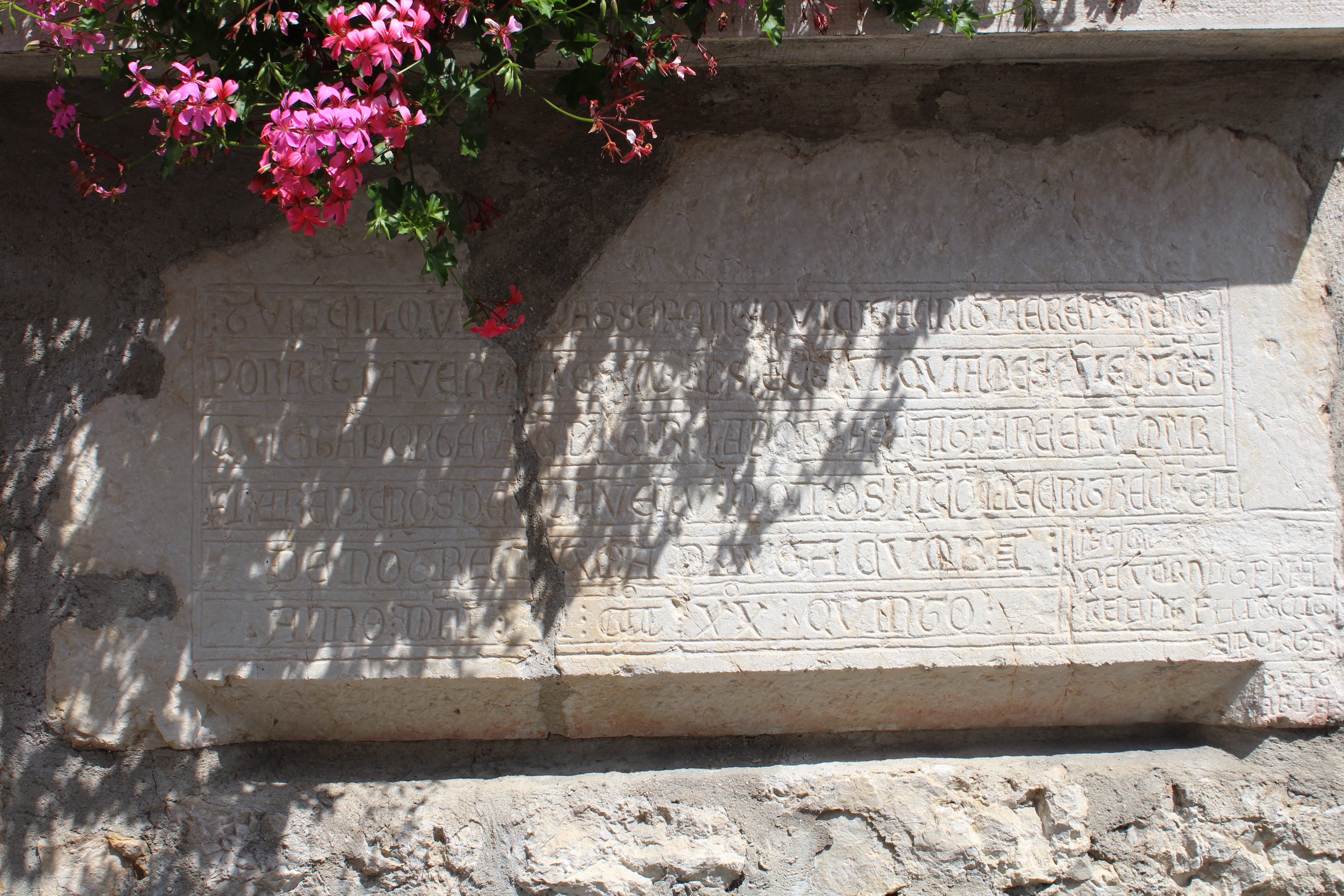 Maison Gallet, Lavours.